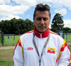 Jhon Jairo Pocillo diaz